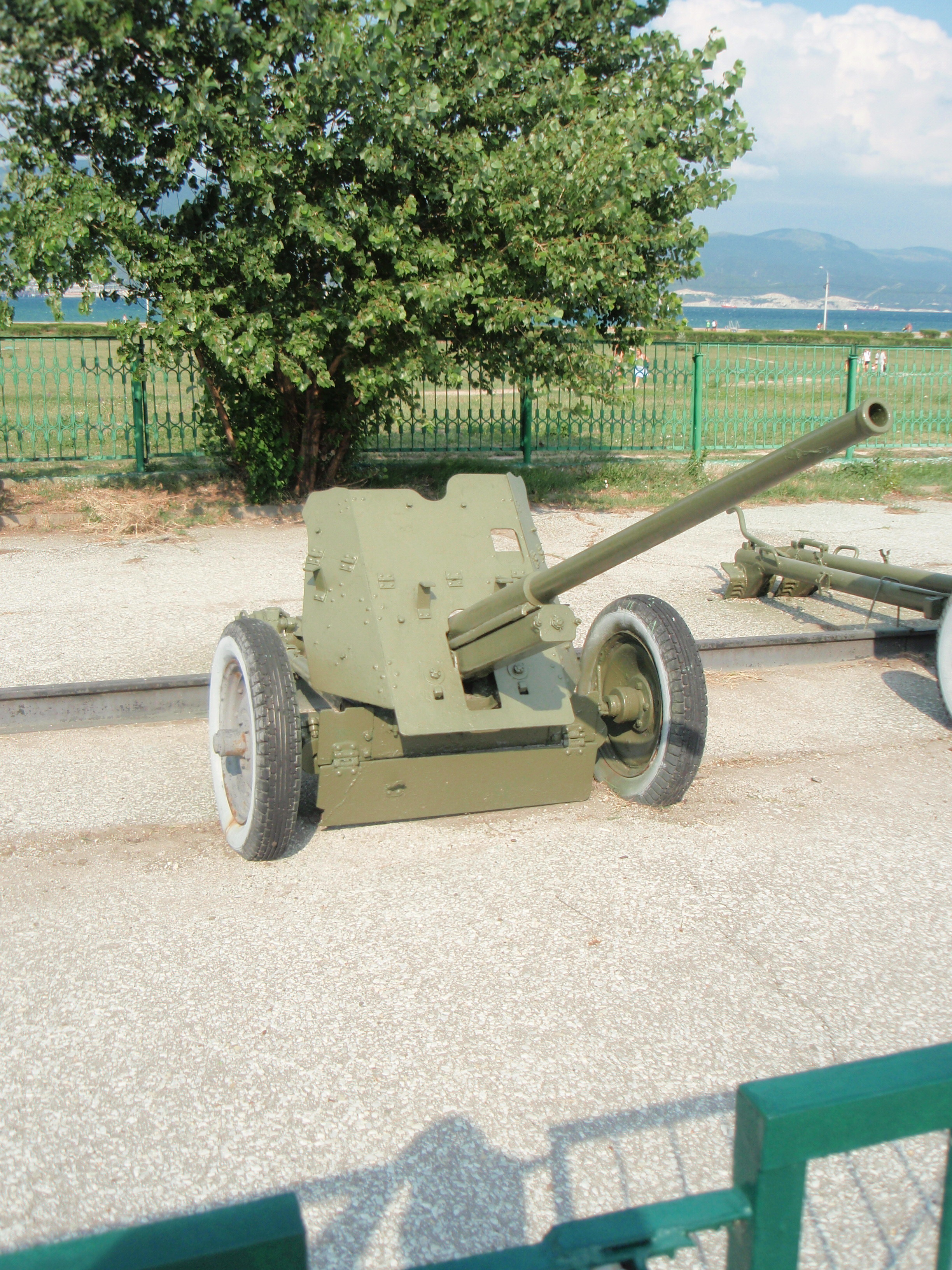 Советская 45-мм противотанковая пушка М-42 в музее-заповеднике «Малая земля» (г.Новороссийск)